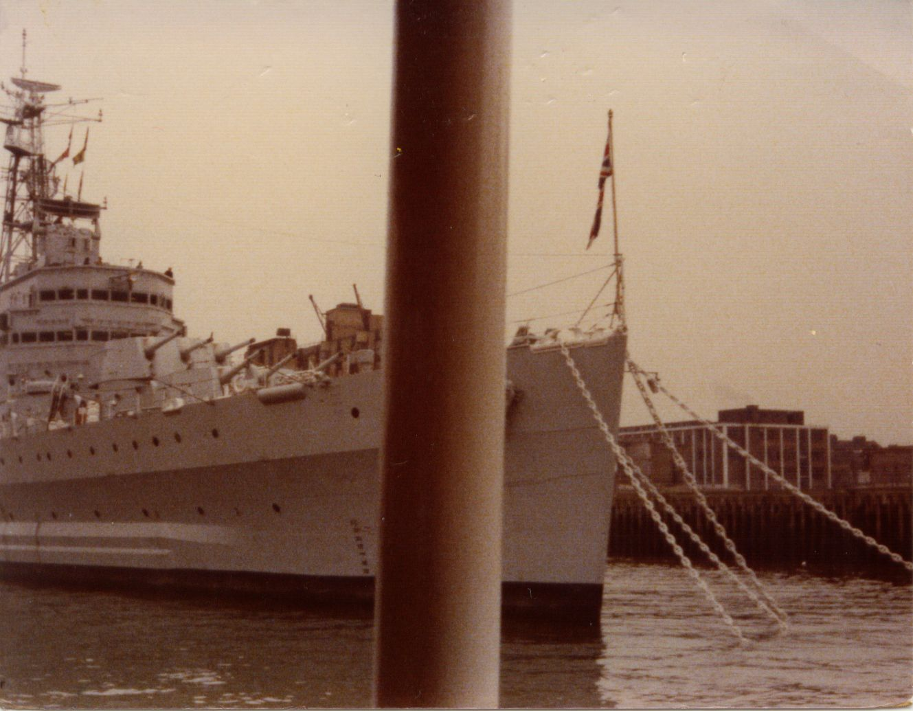 Le Belfast amarré sur la Tamise à Londres